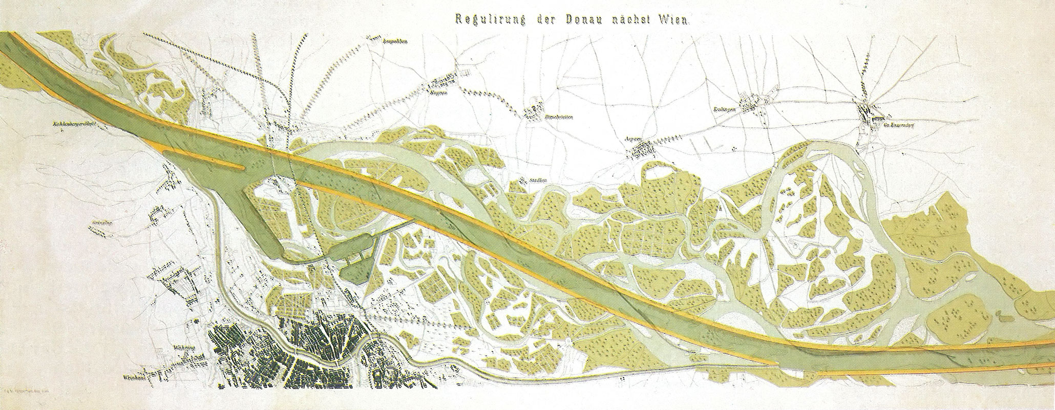 Plan zur Donauregulierung 1875